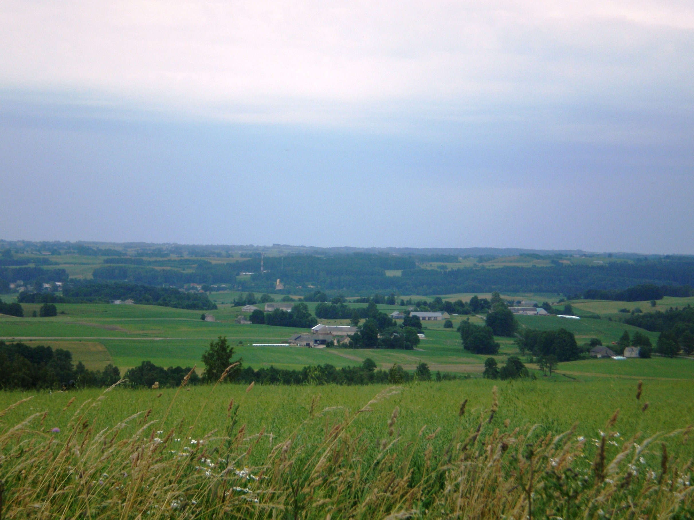 Kamionka, Vižainių raj., Lenkija